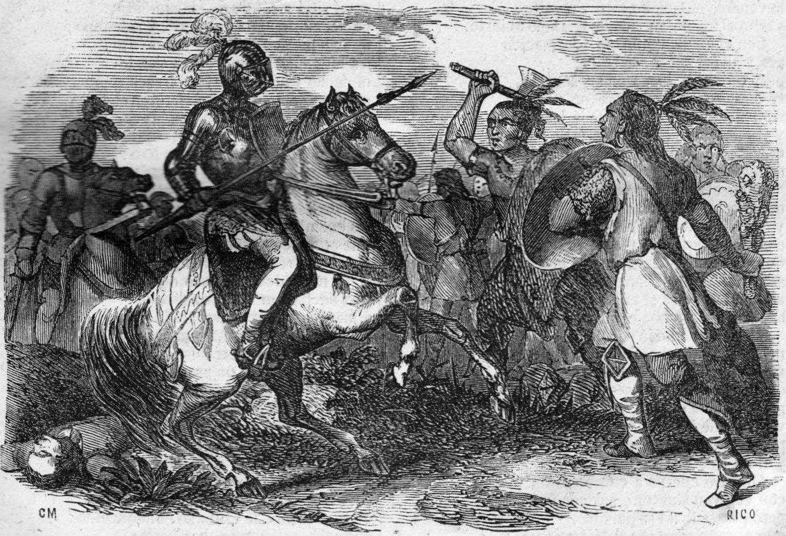 Batalla entre españoles y mapuches. La Araucana : poema / de D. Alonso de Ercilla y Zúñiga. Ed. ilustrada. Madrid : Impr. y Libr. de J. Gaspar Editor, 1884. 168 p.